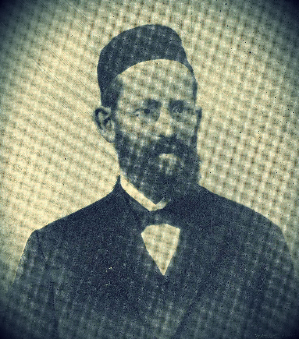 הדפס רשת (צינקוגרפיה) שחור לבן, של דיוקן הרב לרנר. יש להניח כי הדפס זה הוצא מתוך פרסום כלשהו, כנראה מן התקופה שבה כיהן הרב לרנר כרב איחוד הקהילות בלונדון, במחצית הראשונה של שנות התשעים של המאה התשע עשרה.